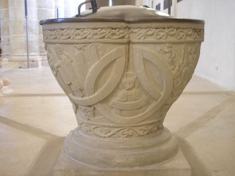 St. Michael (Altenstadt bei Schongau, Obb). Der romanische Taufstein. Eigene Aufnahme, Sept. 2006 / St. Michael (Altenstadt near Schongau, Upper Bavaria, Germany). The romanesque baptistery. Own photo. Sept. 2006